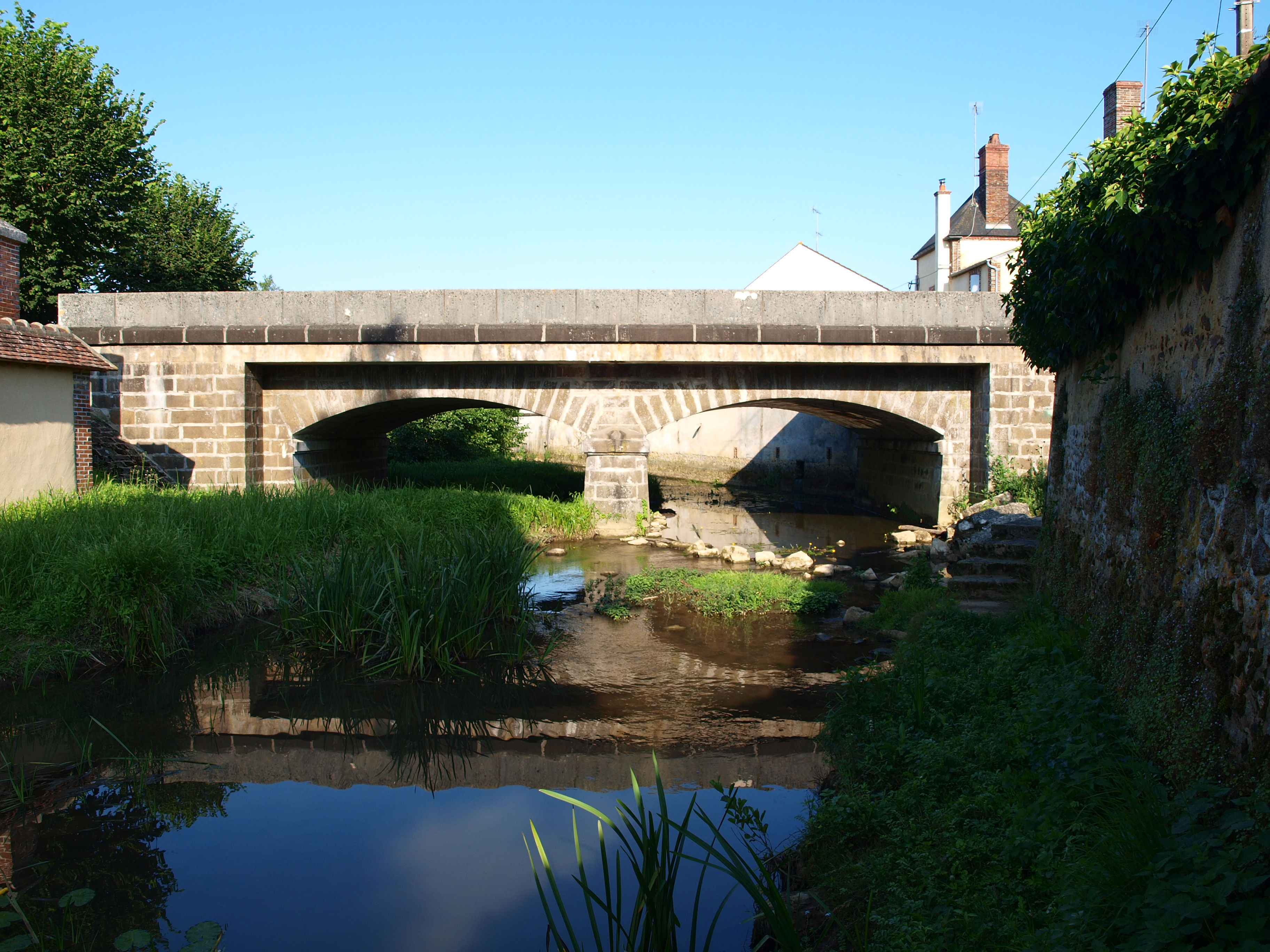 Mézilles (Yonne, France) ; pont de la D 965 sur le Branlin. C'est le pont le plus proche de la rue du Bief.